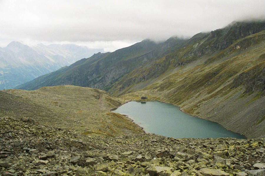 Blick auf den Dösner See vom Buderusweg, gegenüber Arthur-von-Schmid-Haus